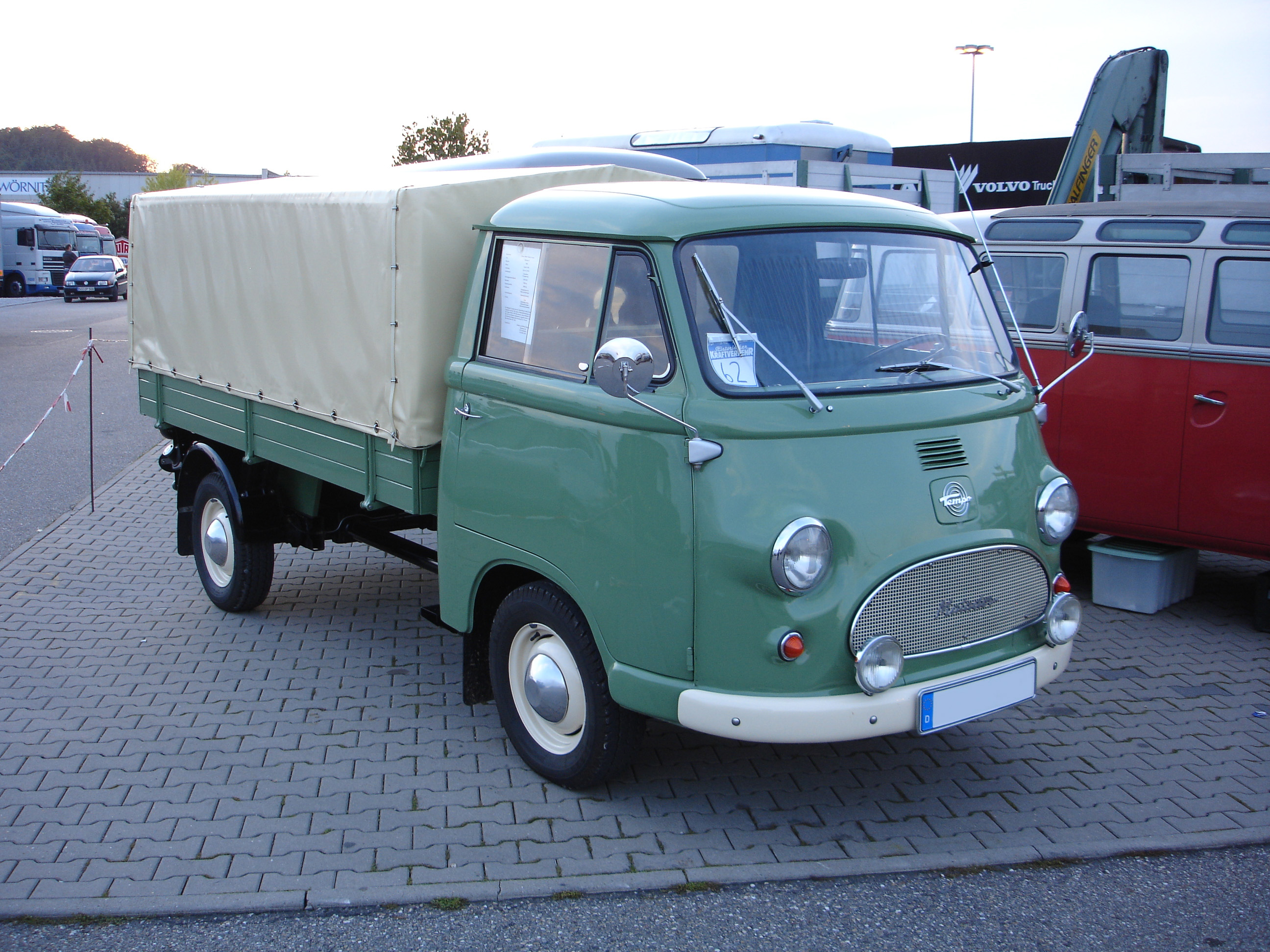 Tempo Matador E Pritschenwagen Kleintransporter Baujahr 1963-67